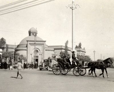 عربات الأحصنة في بغداد العراق عام 1930م